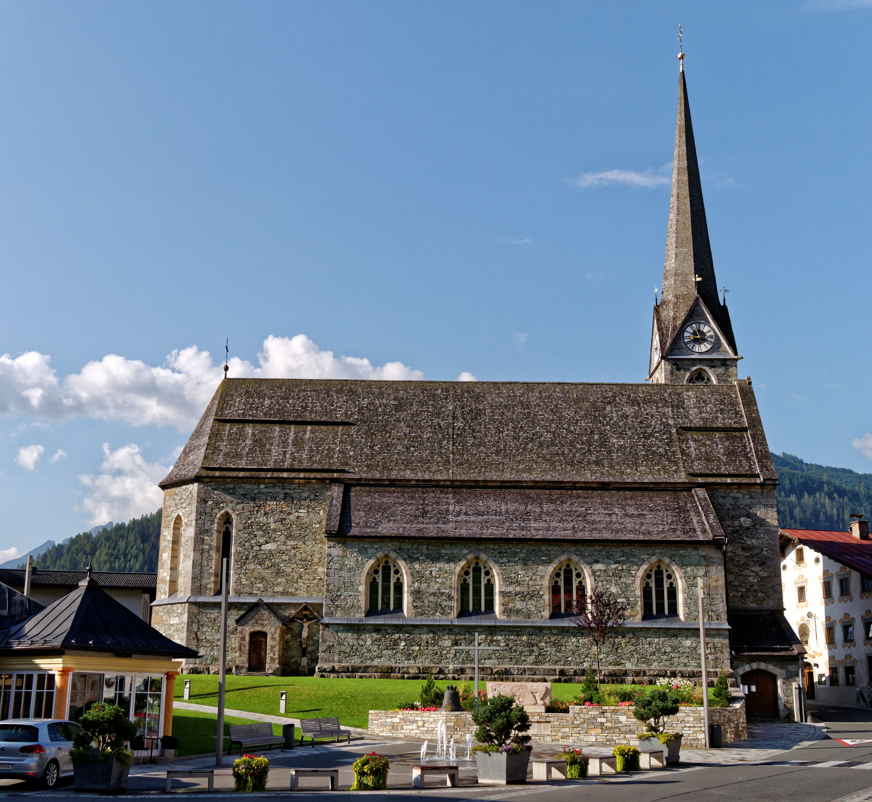 Nordostansicht der Kath. Pfarrkirche hl. Maria in Bruck an der Großglocknerstraße